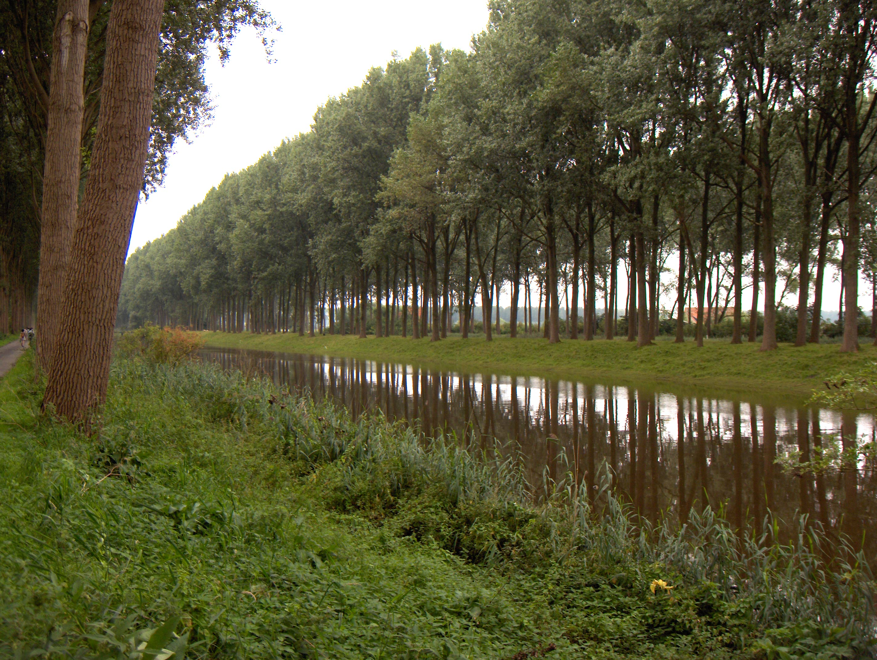 Beschreibung: Schipdonkkanal (Belgien, Westflandern), Strecke zwischen Moerkerke und der Brücke Damme - Lapscheure (im Hintergrund die Baumreihe des parallelen Leopoldkanals) Fotograf: Friedrich Tellberg Datum: 21. August 2005